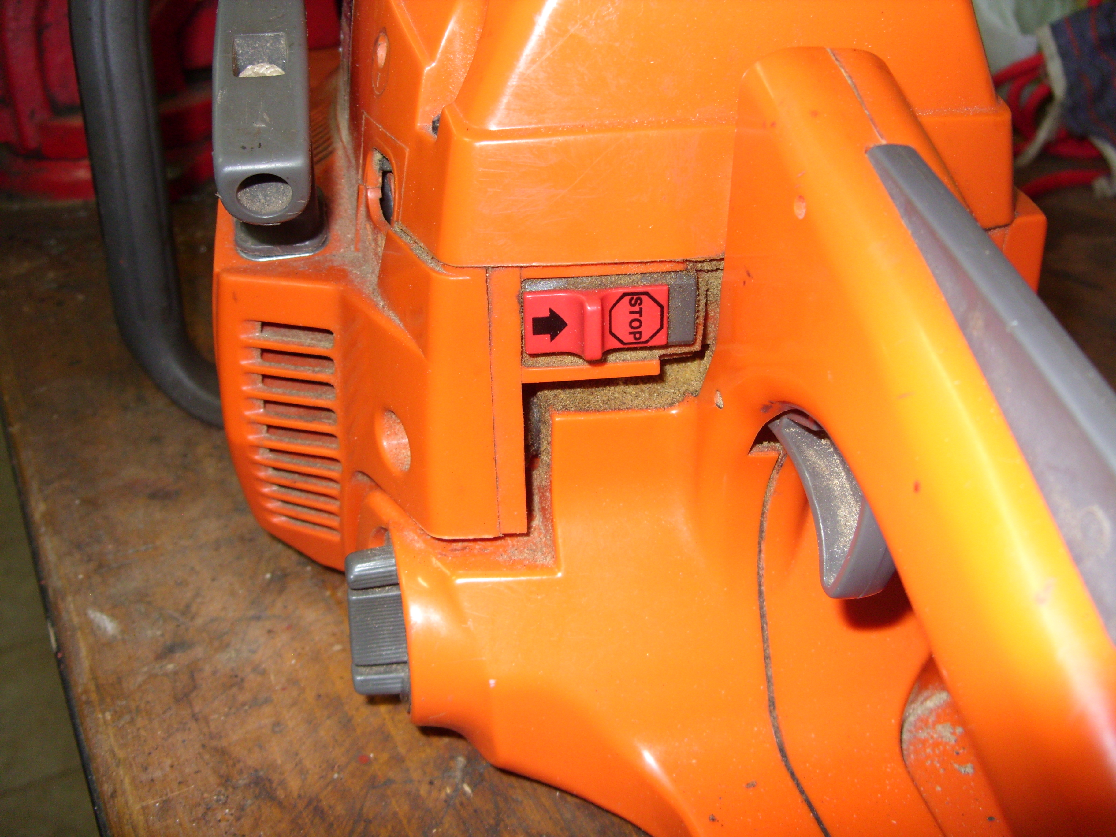 Na sliki vidimo stikalo za vklop in izklop motorne žage. Če hočemo žago ustaviti, moramo stikalo premakniti v desno kar je tudi na gumbu prikazano.